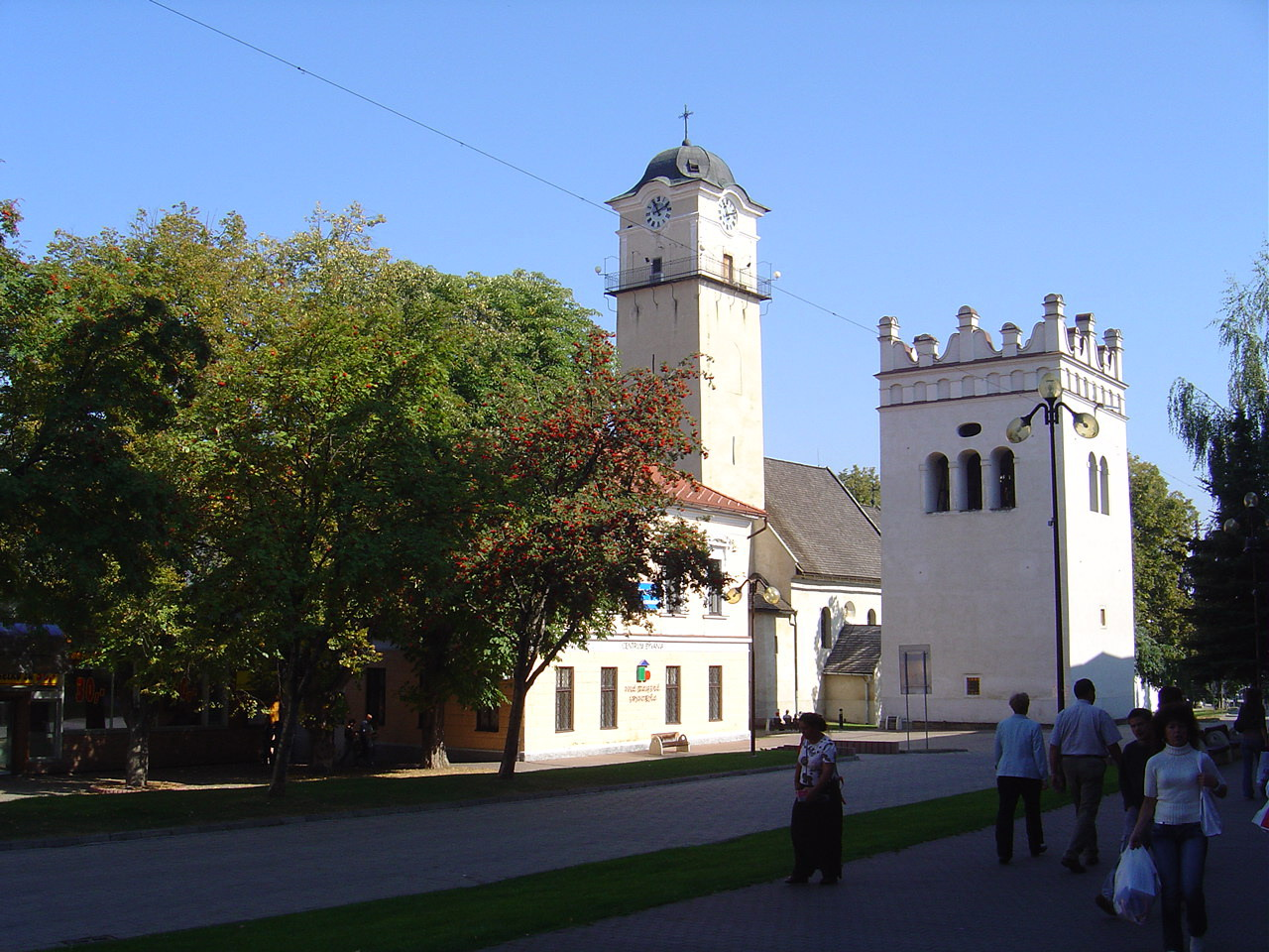 Saint Egidius square in Poprad